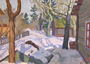 Картина художника А. Д. Кайгородова (1878-1945) «К весне».